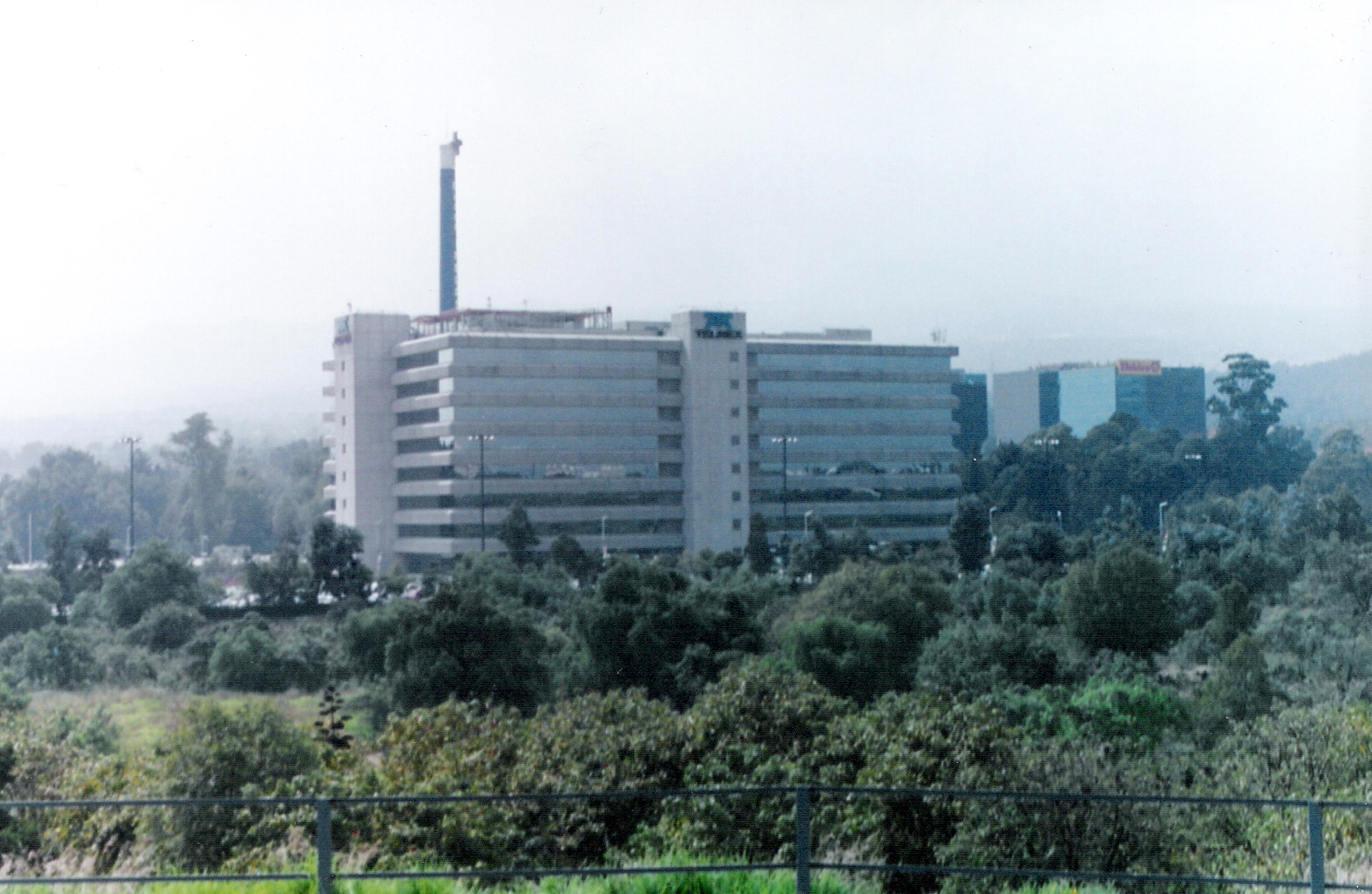 tome esta foto desde la reserva de cuicuilco. en esta se aprecia un edificio de telmex.